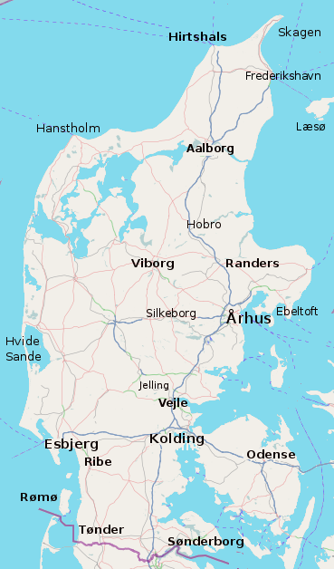 Cartina dello Jutland in scala 1:3.500.000